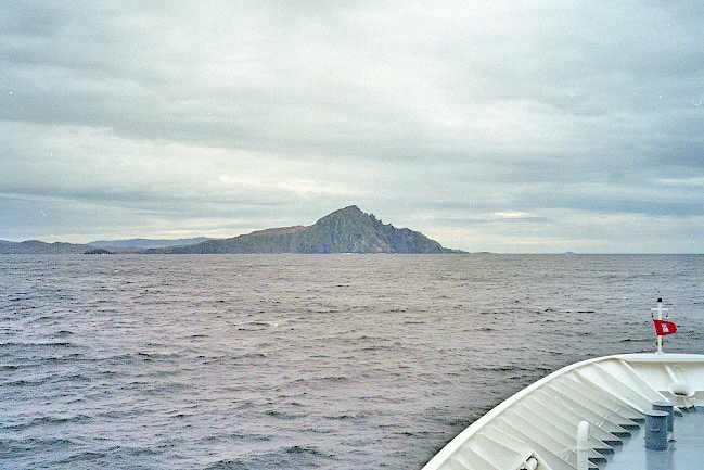 *Sujet:Kap Hoorn vum Mier aus gesinn Source:Eege Foto vum User:Stan Shebs